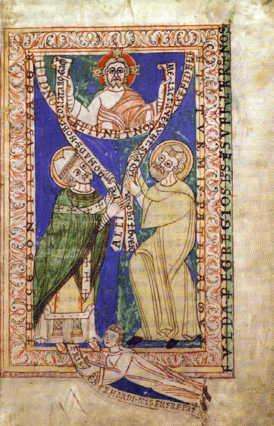 Widmungsbild des Codex Eberhardi, Staatsarchiv Marburg, K 426 Bl. 6r From top, clockwise: Christ, Sturm, Eberhard, Boniface. Sturm, founder and first abbot of Fulda (dressed as a monk), and Boniface (dressed as bishop) offer the Fulda possessions to Christ. Eberhard kneels at Boniface's feet.